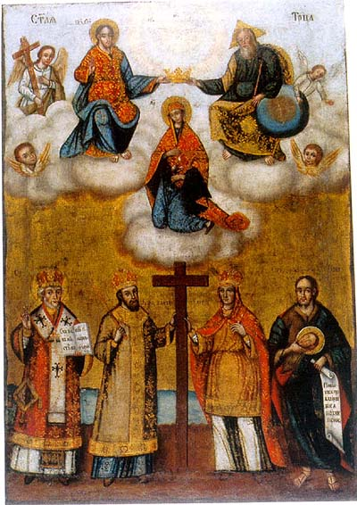 Фотографија иконе аутора Димитрија Бачевића Темпера на дрвету 1770. године, пренето са сајта: Овде